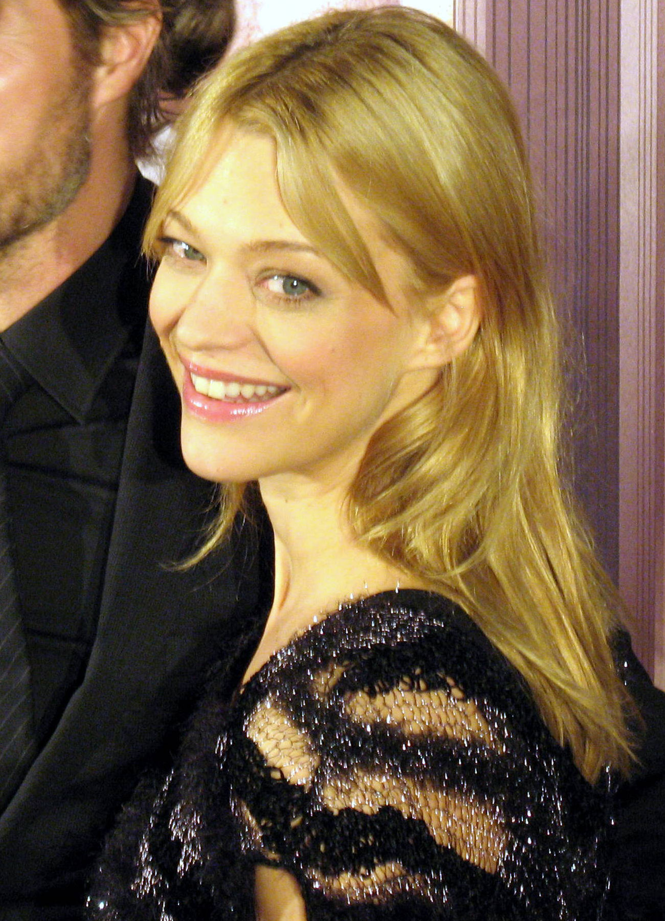 Heike Makatsch, 25. November 2009